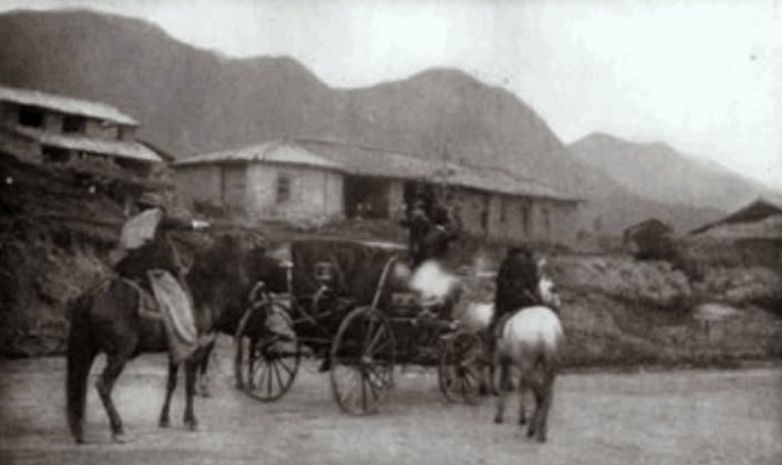 Ataque al Presidente. El capitán Pomar contesta el fuego.